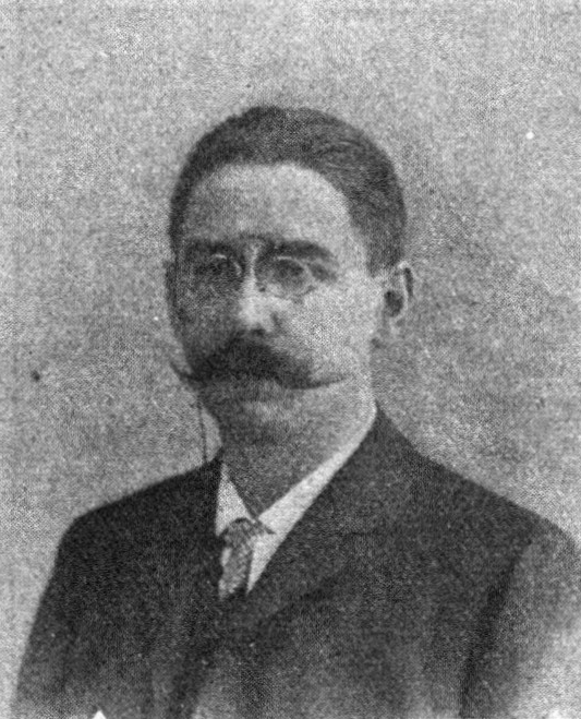 Österreichischer Politiker, Reichsratswahl 1907, Name siehe Dateiname